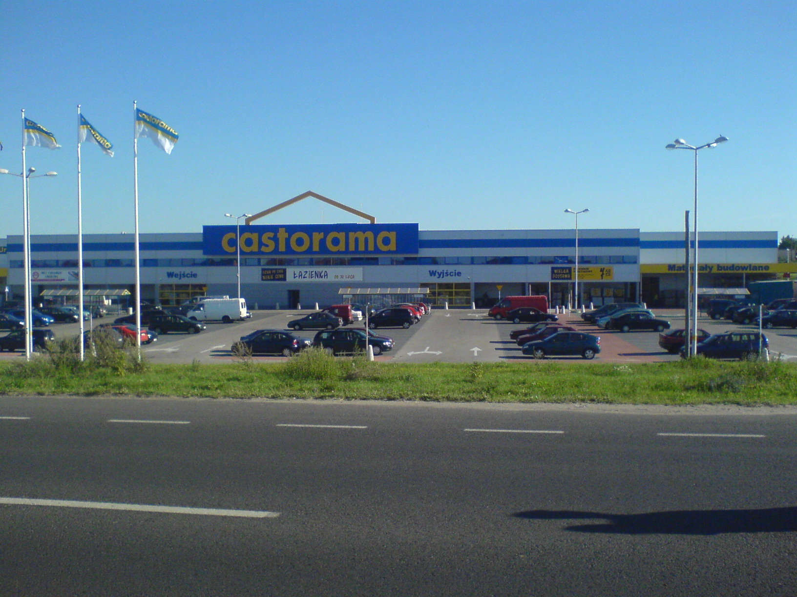 Market Castorama w Głogowie.